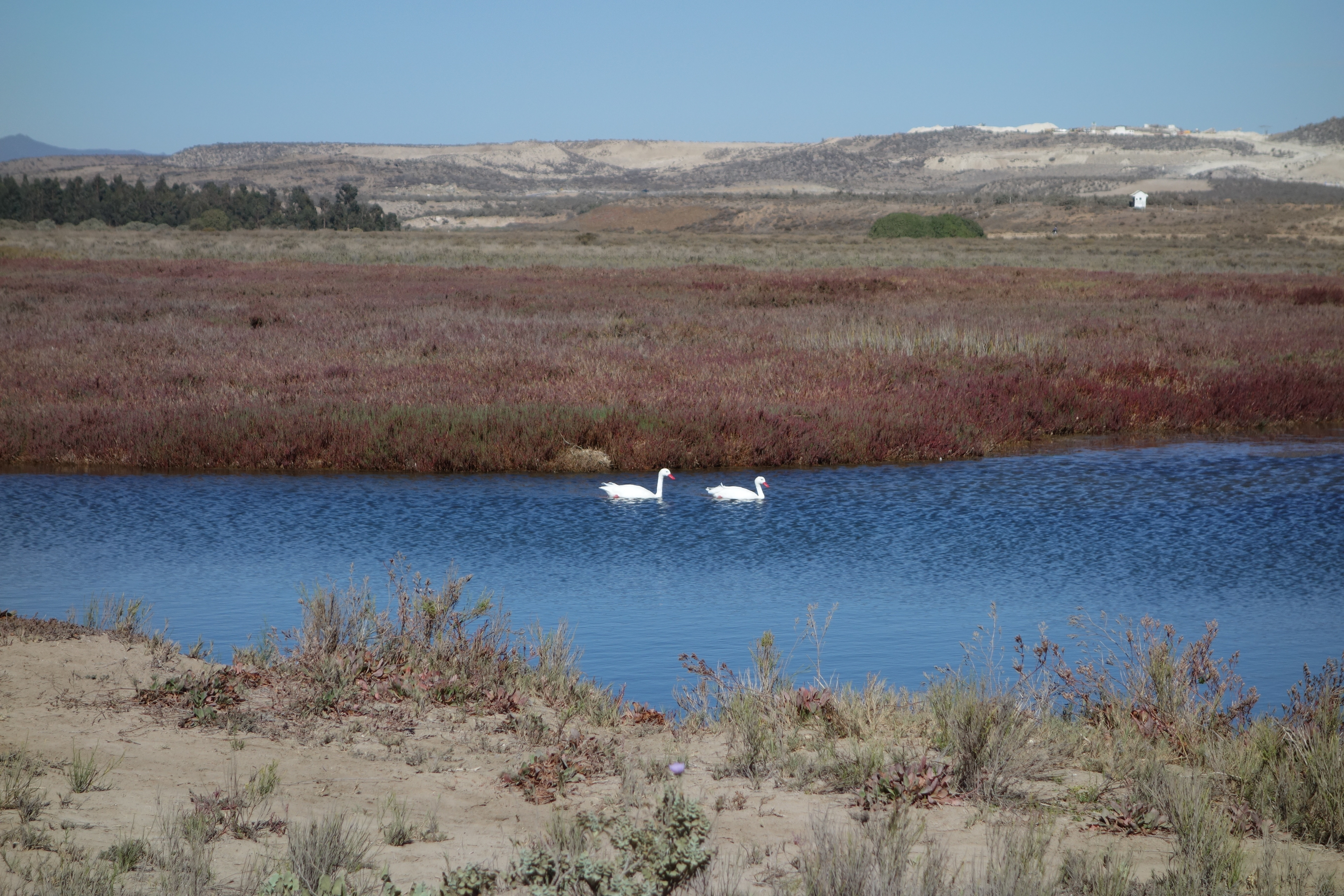 Cisnes Coscoroba en Humedal de Tongoy